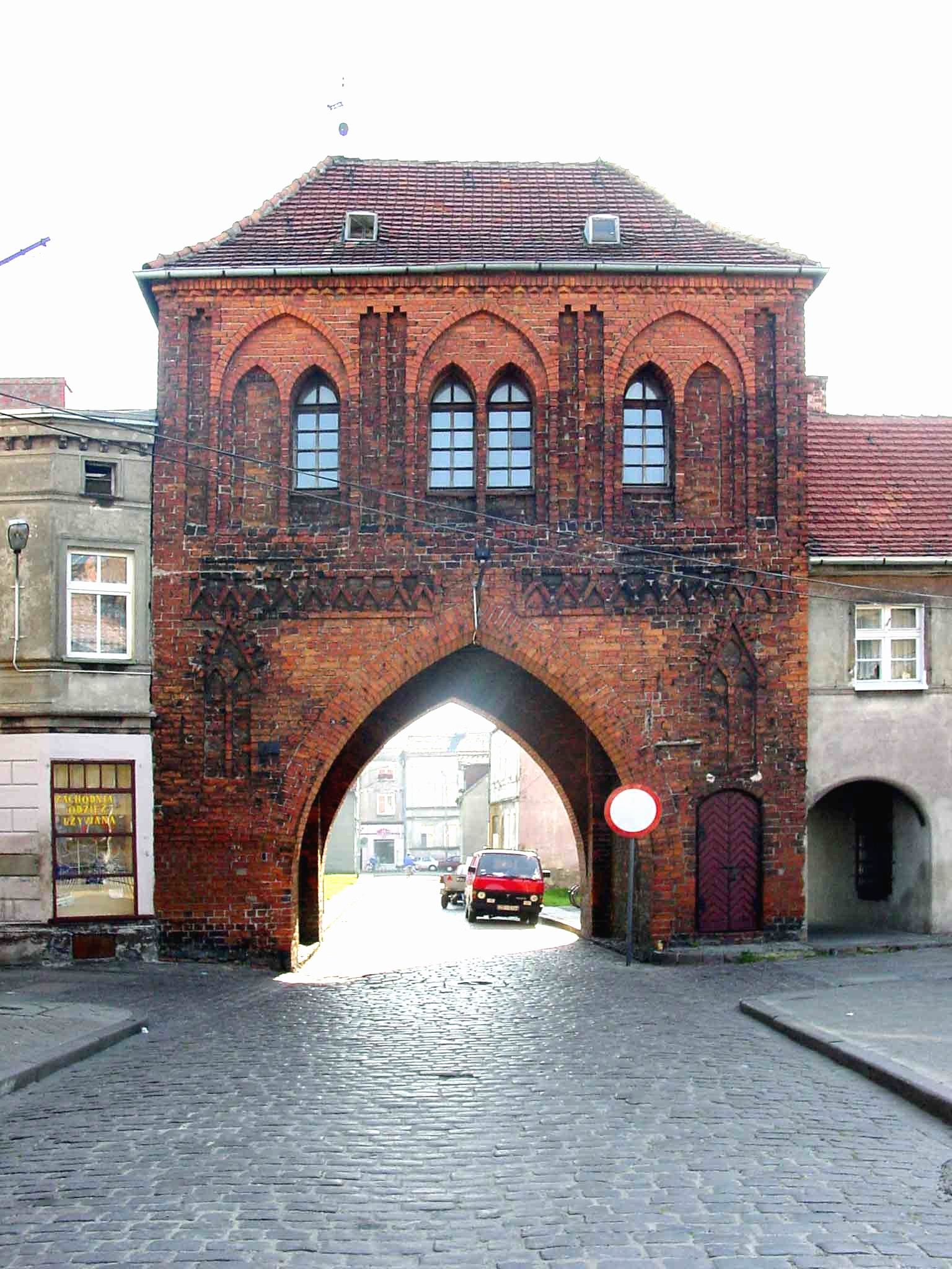 Brama Połczyńska, Białogard; autor zdjęcia Kluka, 12.10.2003r.